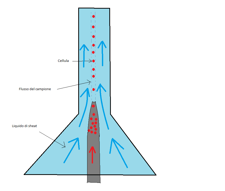 descrizione del meccanismo di focalizzazione idrodinamica